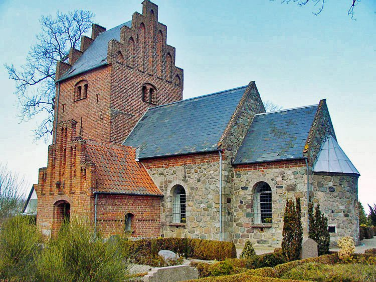 fra sydøst